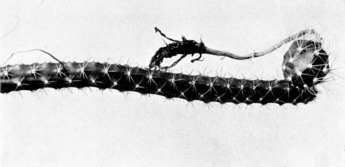 Selenicereus nelsonii (Hylocereeae; Cactaceae; Planta) Nathaniel Lord Britton és Joseph Nelson Rose "The Cactaceae" c. könyvéből